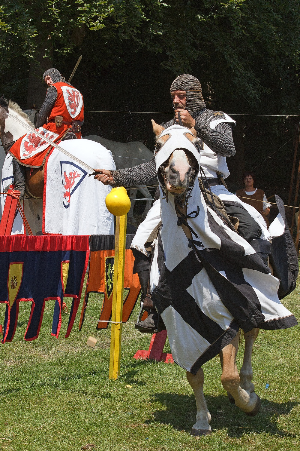 Maximilianpark Hamm, Datum/Uhrzeit: 06.06.2010 13:12:10